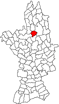 Categorie:Hărţi ale judeţului Olt